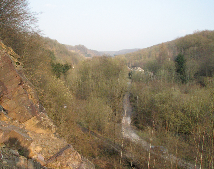 Eigen foto genomen van op de klimrotsen, in de verte het station